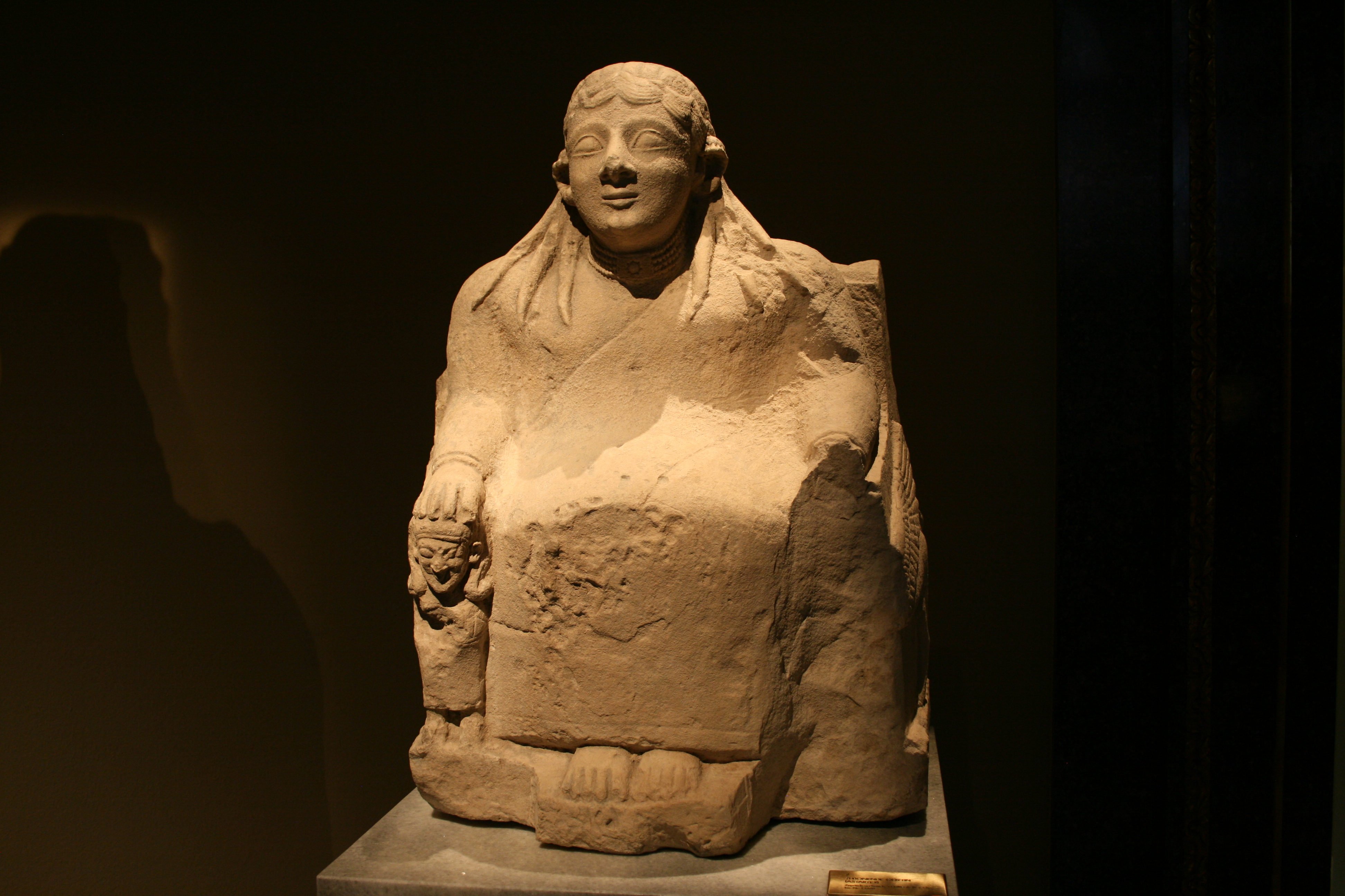 thronende Astarte